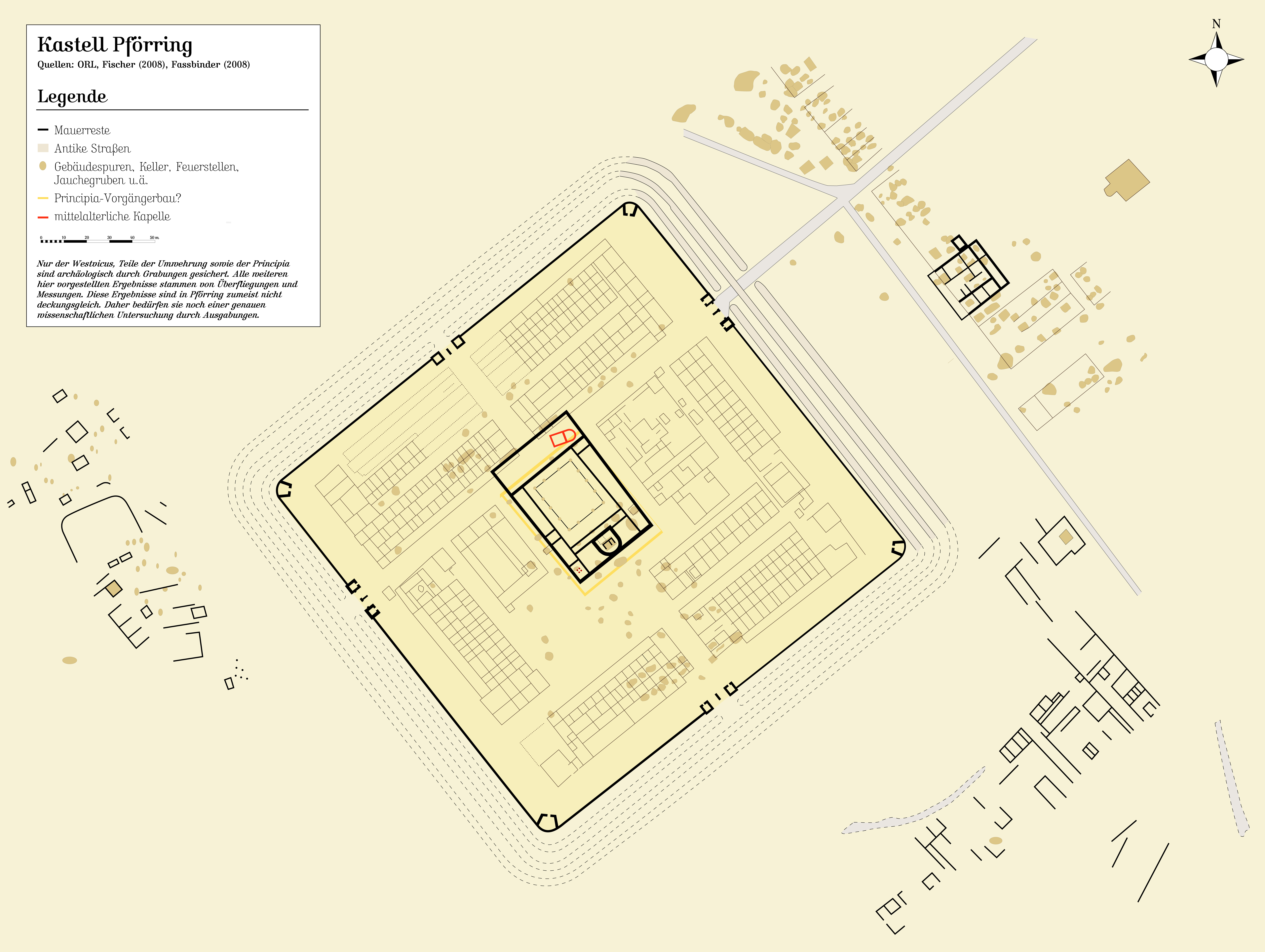 Kastell Pförring mit Vicus nach den Grabungen RLK, des Landesdenkmalamtes, Luftbildüberfliegungen sowie Magnetfeldmessungen. Die Quellenangaben finden sich in der Zeichnung selber.